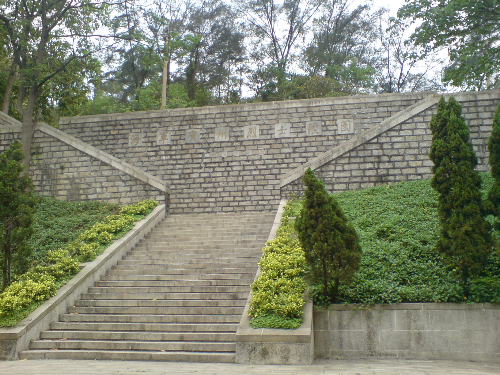 位于广州长洲岛的海军广州烈士陵园